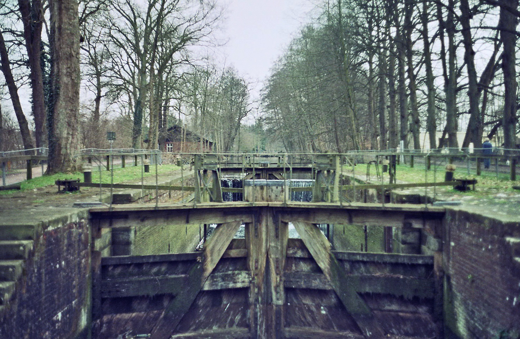 Koppelschleuse Meppen